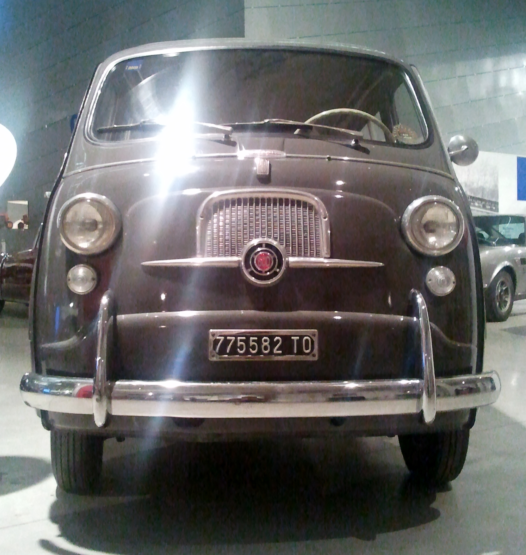 Fiat 600 Multipla en el Centro Storico Fiat